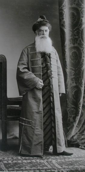 Князь Александр Сергеевич Долгорукий на костюмированном балу 1903 года.